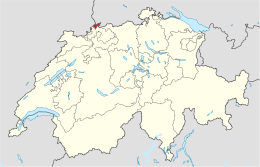 ff